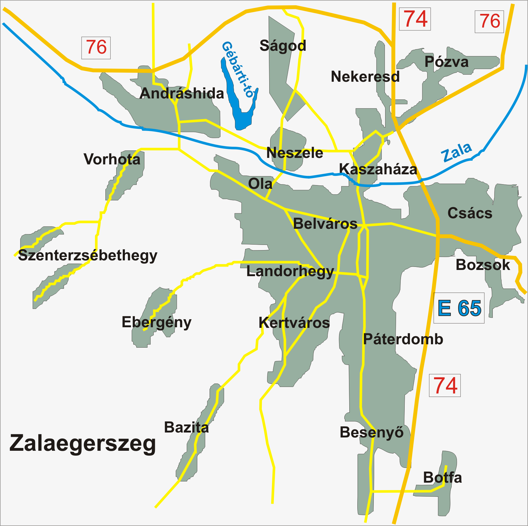 Self drawn map of Zalaegerszeg.